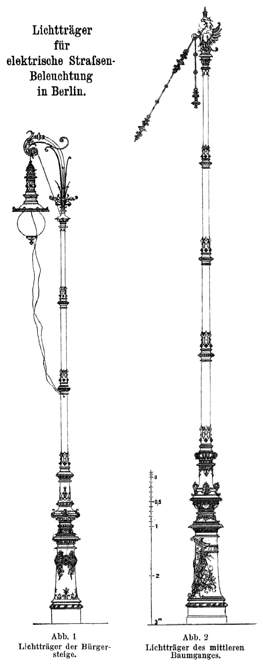 Schupmann-Kandelaber, Zeichnung von 1888. Aus: Centralblatt der Bauverwaltung, 8. Jahrgang 1888, Nr. 18, 5. Mai 1888, S. 195–196 (Bild auf Seite 194)